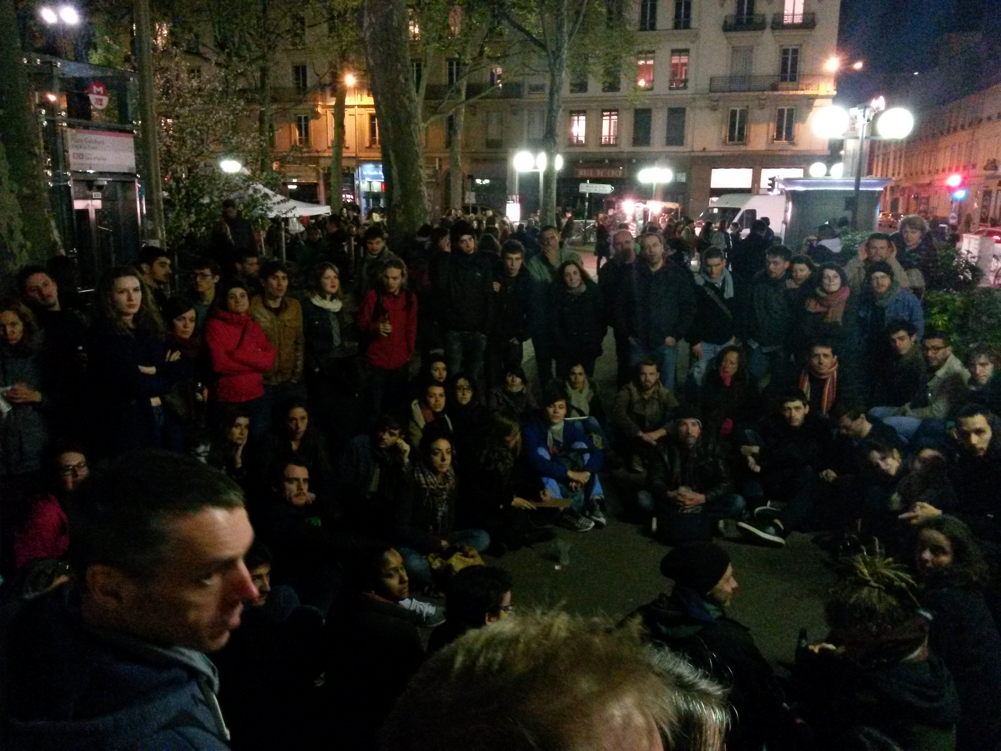 Atelier de réflexion sur l'écriture d'une nouvelle constitution, Nuit Debout Lyon, le 9 mars 2016, Place Guichard